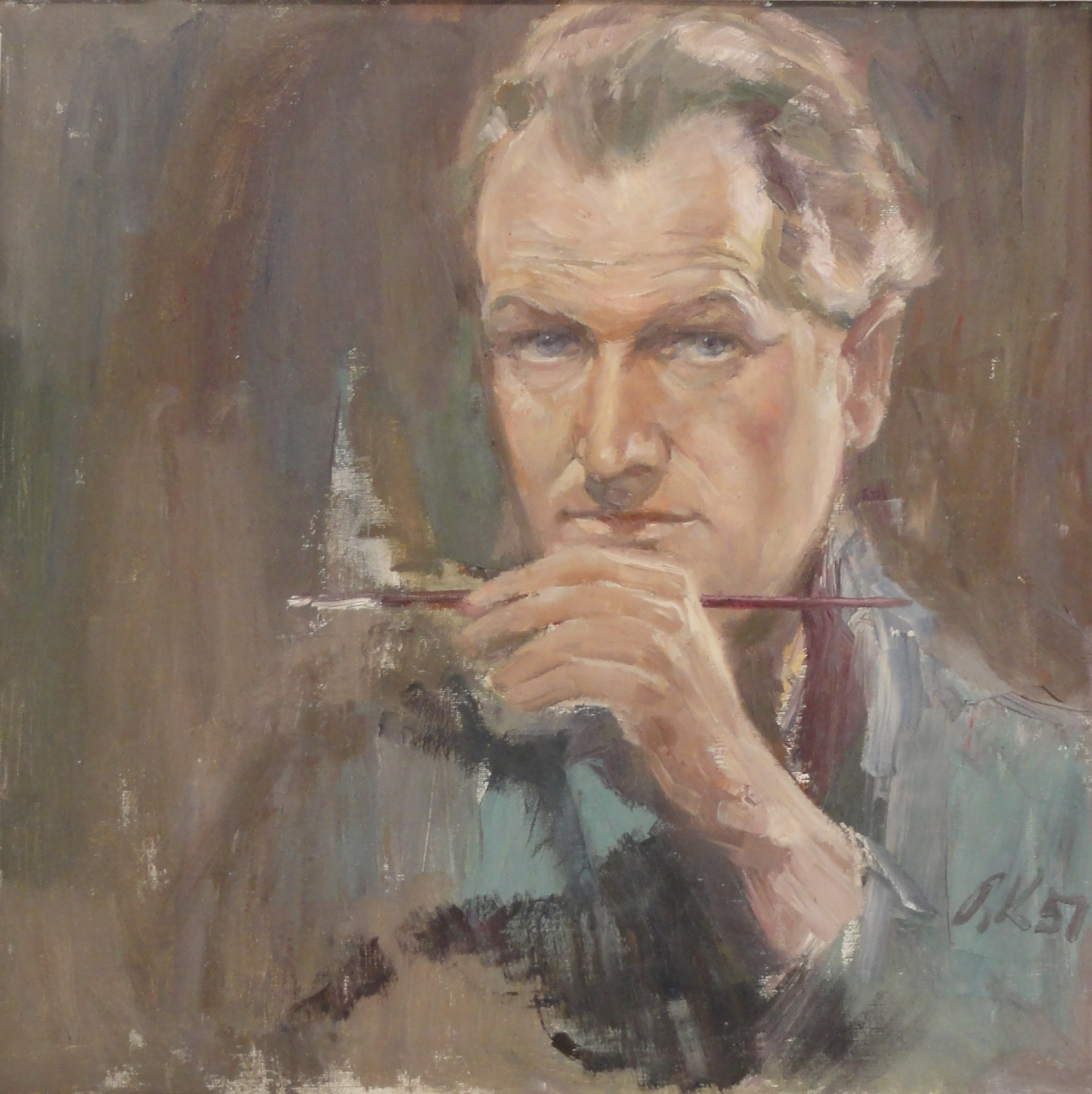 Oskar Kreibich: Selbstbildnis 1951, Öl auf Leinwand, Kunstsammlung Stadt Backnang, Inv. 8526